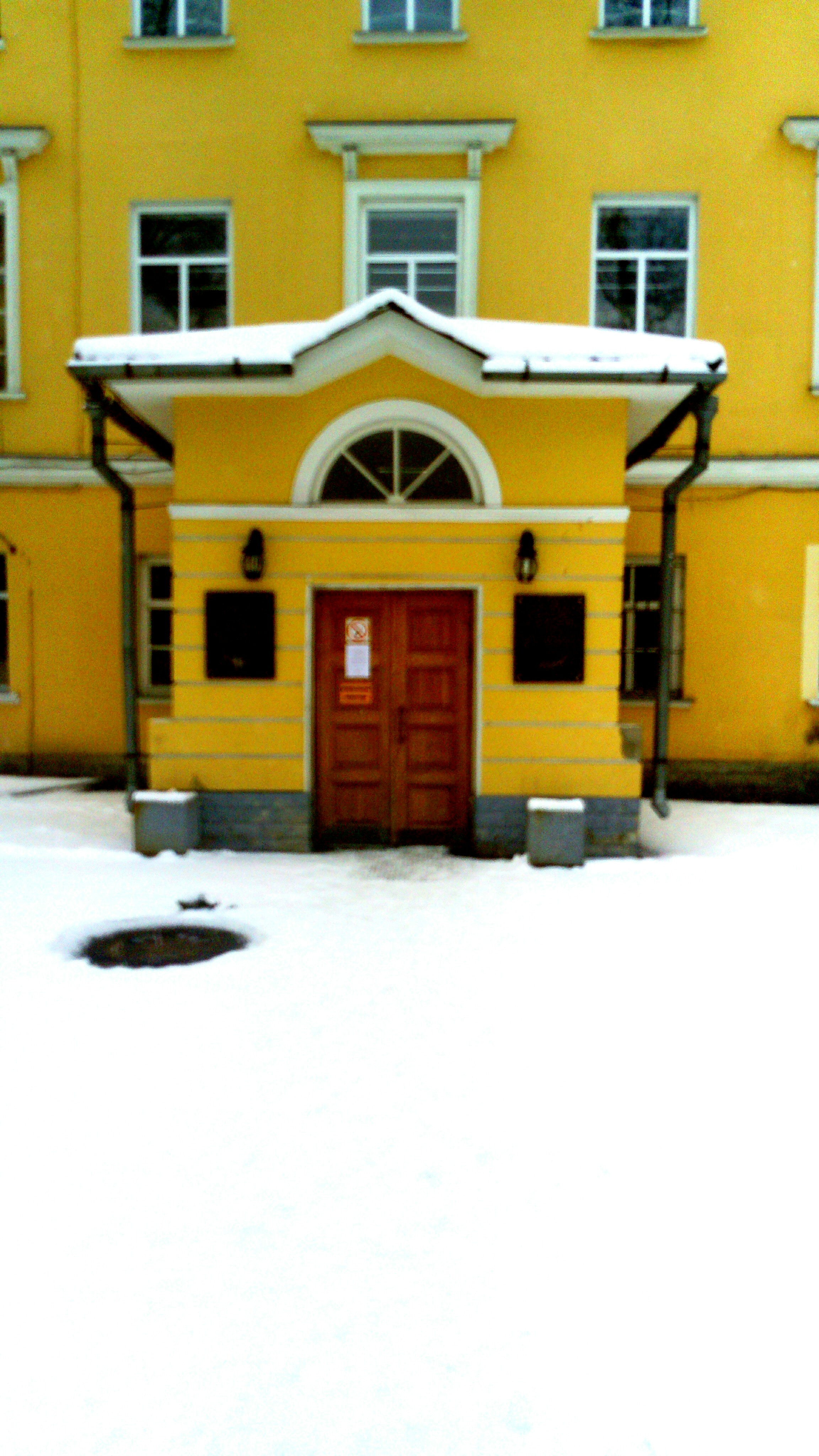 Психиатрическая клиника святого Николая Чудотворца на Пряжке. Главный вход.